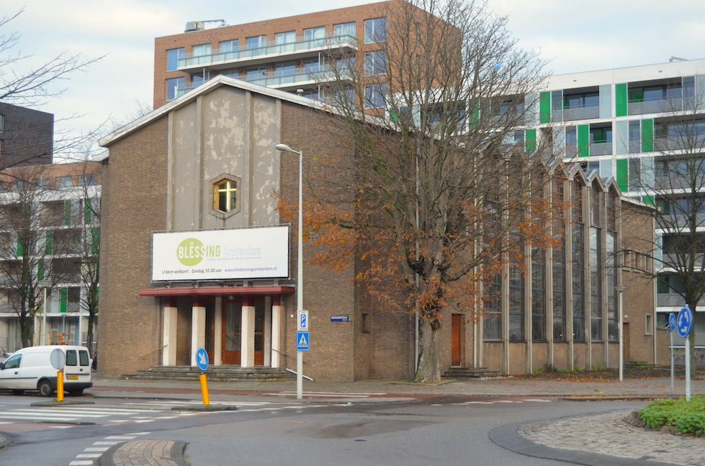 Calvariekerk (Overtoomse Veld), 1956; architect: H. Geels. Foto: Erik Swierstra.